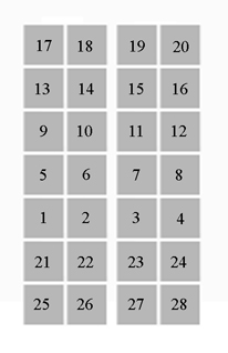 Schema con la disposizione delle formelle nella porta nord del Battistero di San Giovanni Battista a Firenze. Disegno eseguito personalmente. In modo analogo alla porta di Andrea Pisano, anche questa è suddivisa in 28 formelle, con scene inquadrate dalla medesima cornice a losanga lobata. Le prime 20 formelle superiori narrano storie del Nuovo Testamento, e si susseguono nelle file su entrambi i battenti e a partire dalla fila inferiore (da 1 a 20); le ultime due file mostrano i quattro evangelisti (penultima fila, da 21 a 24) e quattro Dottori della Chiesa (ultima fila, da 25 a 28). Annunciazione Natività Adorazione dei Magi Disputa con i dottori Battesimo Tentazioni nel deserto Cacciata dei mercanti dal tempio Gesù cammina sulle acque e salva Pietro Trasfigurazione Resurrezione di Lazzaro Ingresso a Gerusalemme Ultima cena Veglia nell'orto degli ulivi Cattura di Gesù Flagellazione Gesù dinanzi a Pilato Salita al Calvario Crocifissione Resurrezione Pentecoste San Giovanni Evangelista San Matteo San Luca San Marco Sant'Ambrogio San Girolamo San Gregorio Sant'Agostino